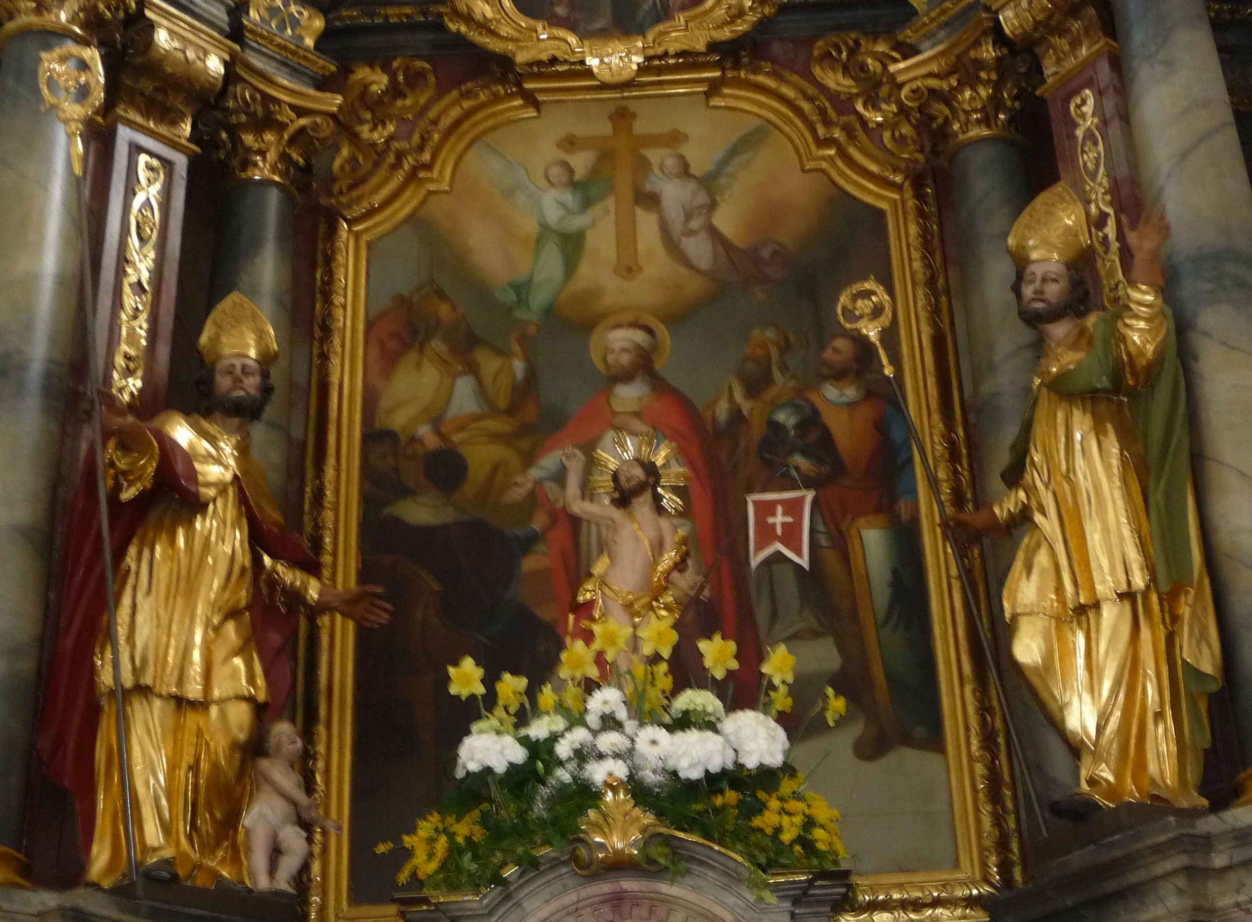 Sankt Wenzeslaus (Litzendorf)